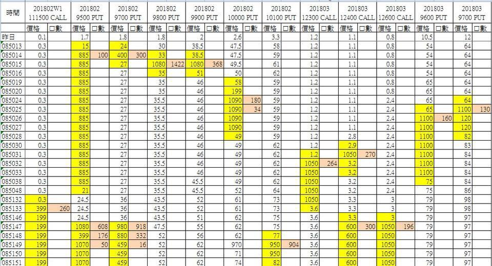 中文（台灣）: 1秒鐘漲停